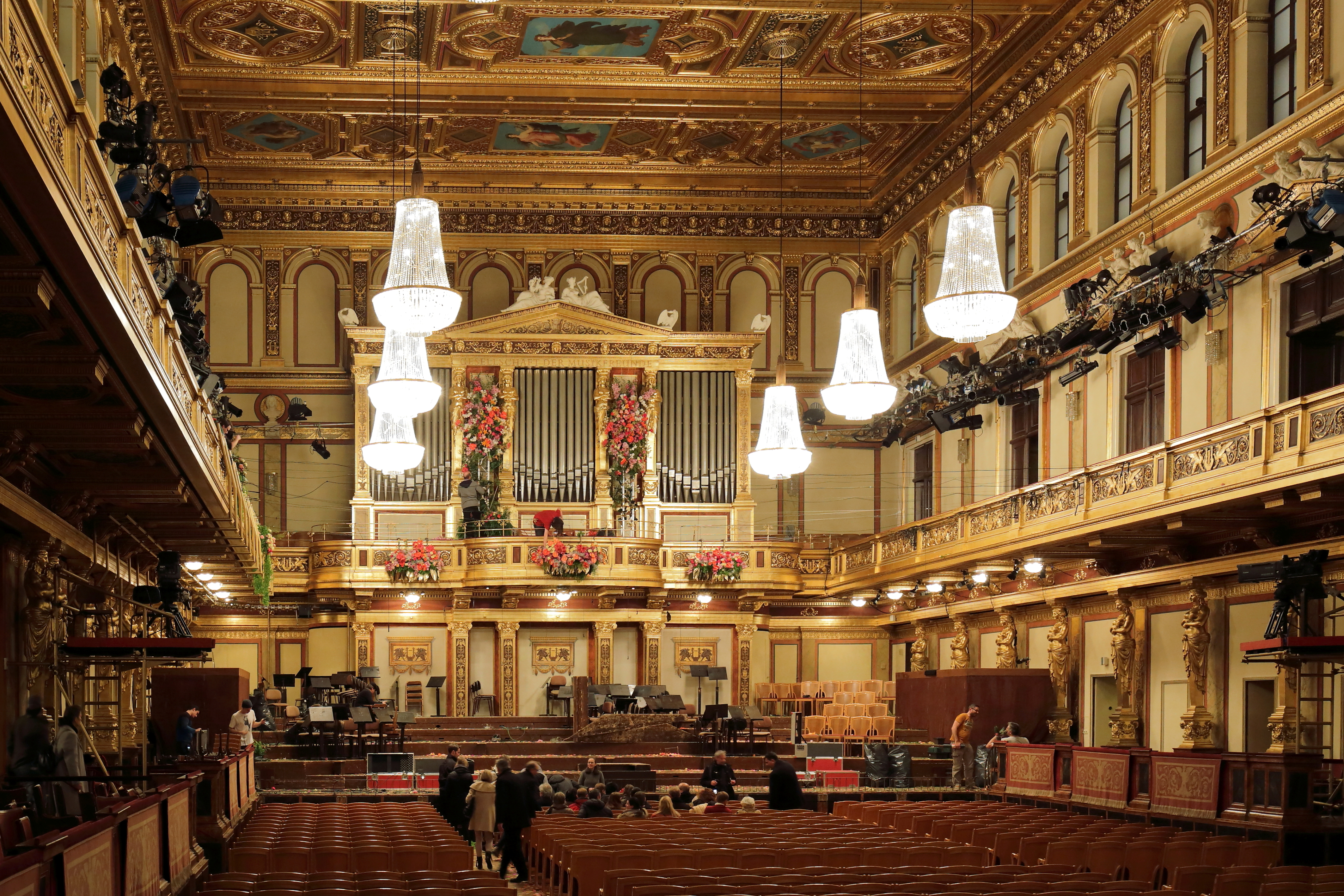 Der große Saal, auch als "Goldener Saal" bezeichnet, im Wiener Musikvereinsgebäude (rund 2 Stunden nach dem Ende des Neujahrskonzertes 2015). Der Innenausbau besteht zur Gänze aus Holz, das großteils mit goldener Farbe lackiert wurde.